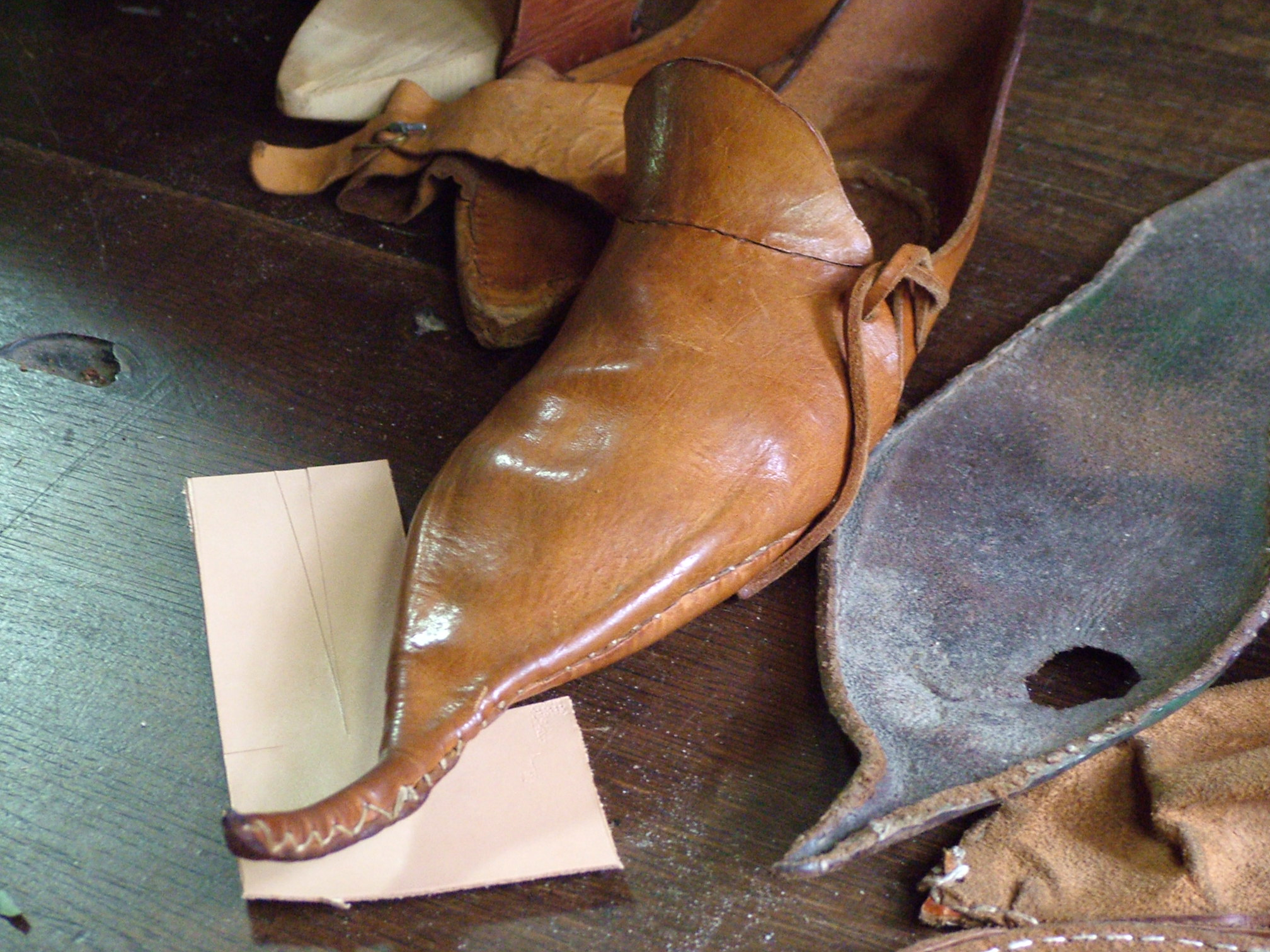 Archeon, Schnabelschuh beim Schuhmacher.